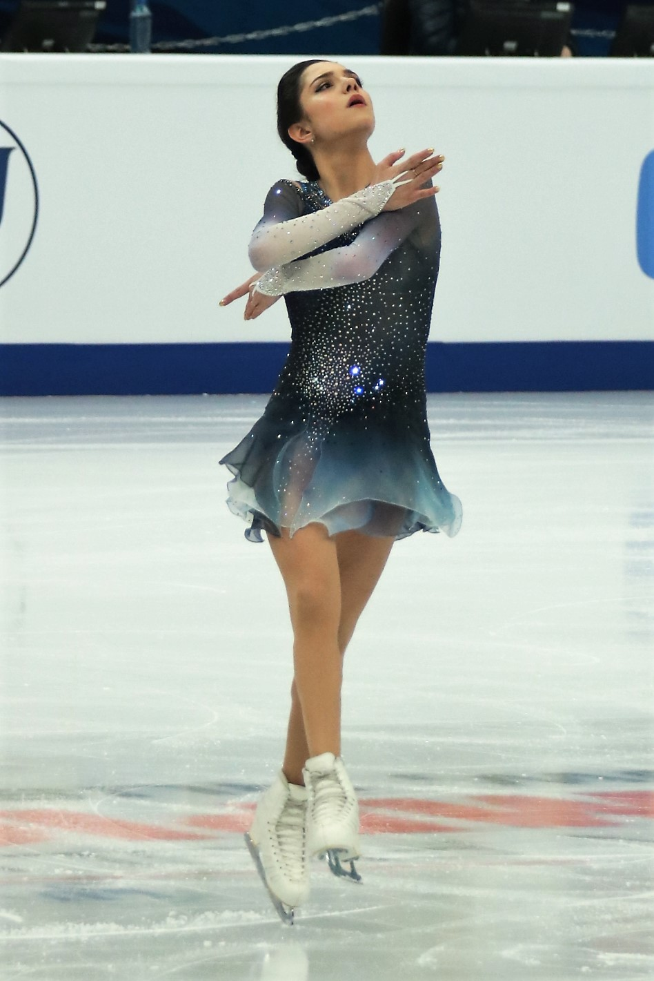 Евгения Медведева (Россия) на Чемпионате Европы по фигурному катанию 2018.